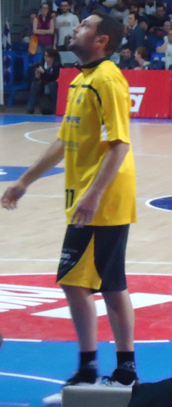 Jaime Heras marzo 2015